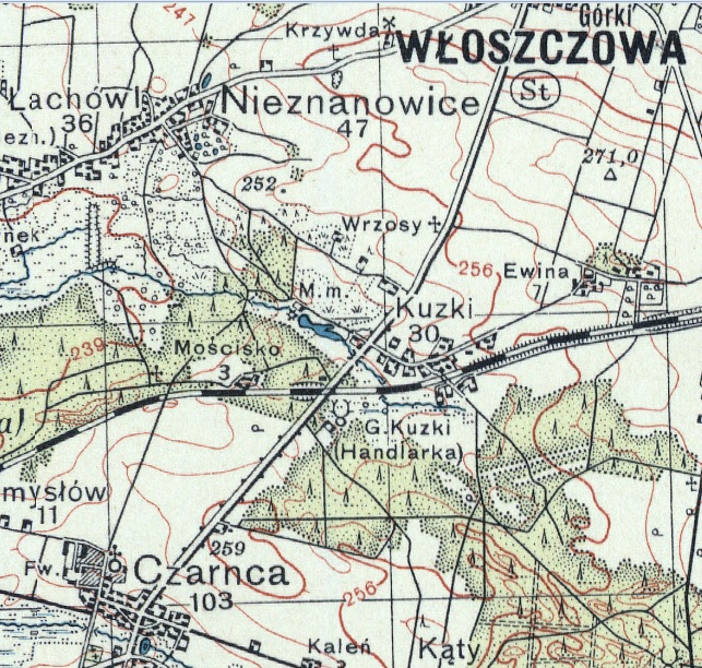 Mościska na mapie Wojskowego Instytutu Wojskowego z 1936 roku.